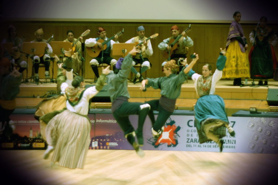 Aragonés: Jota aragonesa